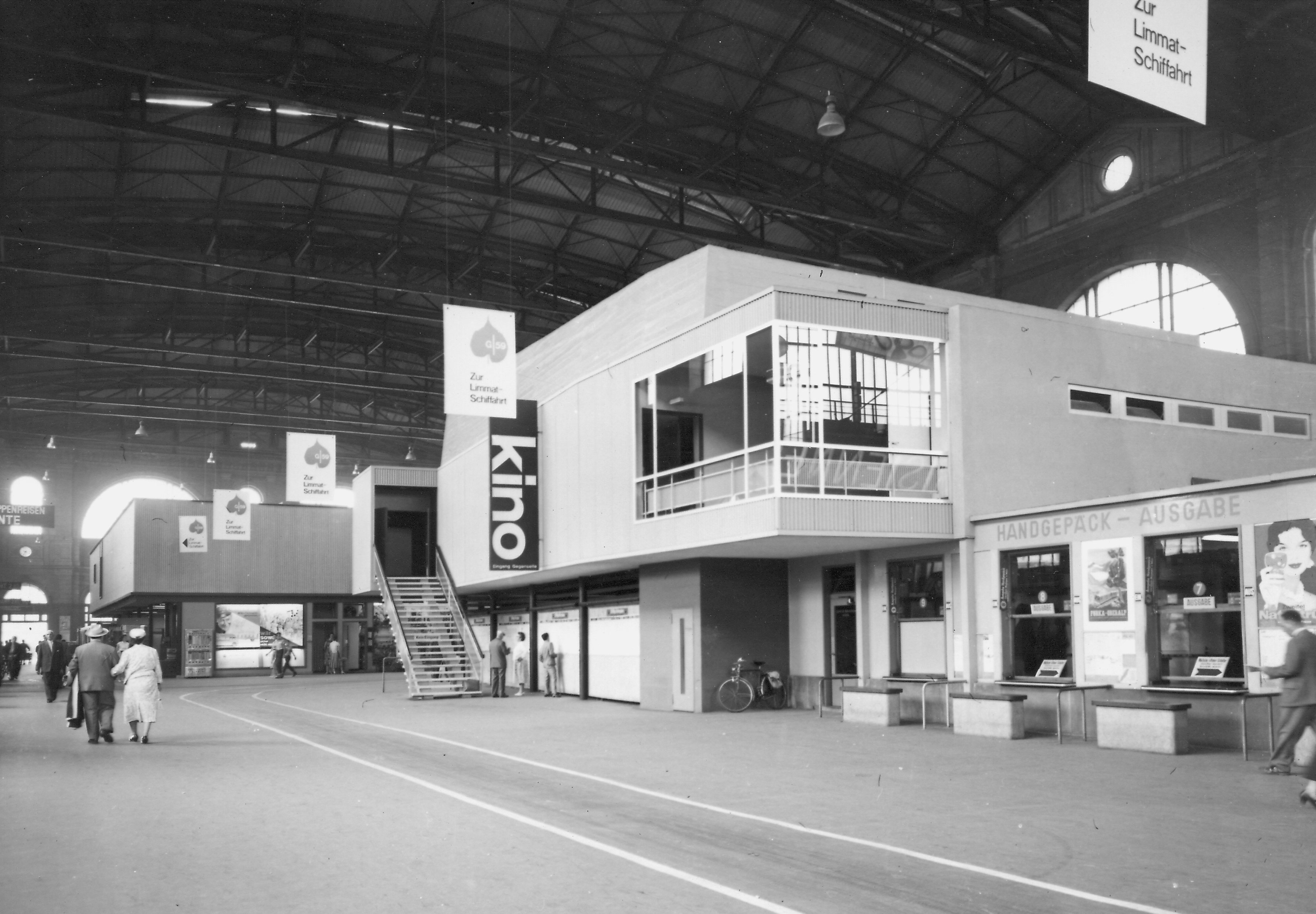 Zürich Hauptbahnhof, Pavillons in der Bahnhofshalle